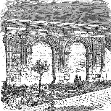 Porte gallo-romaine à Langres, in Géographie du département de la Haute-Marne par Joanne, Adolphe (1813-1881), p. 23